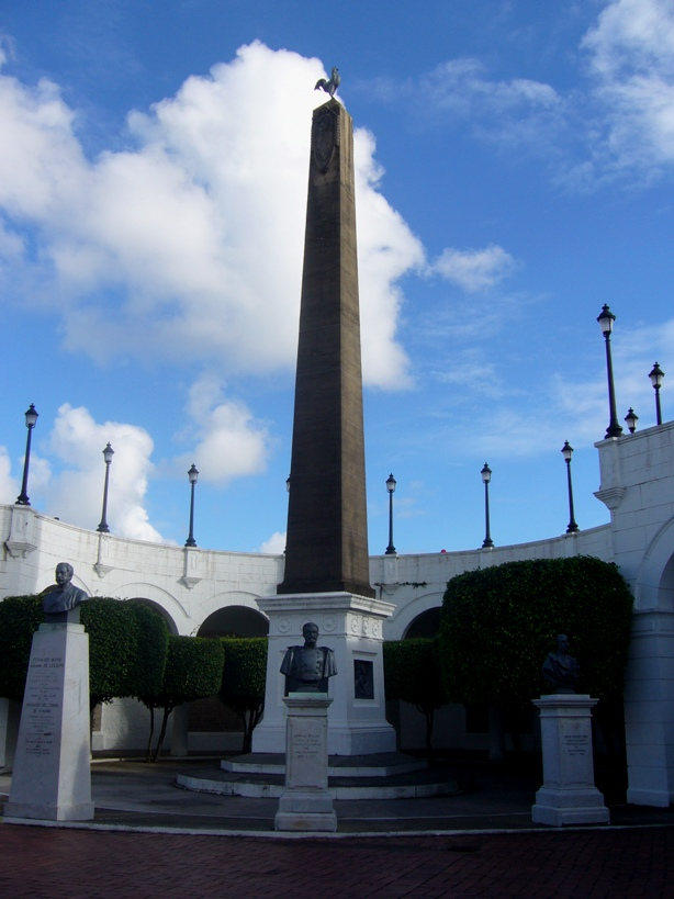 A la Memoria de los Franceses, Plaza de Francia, Casco Antiguo de Panamá